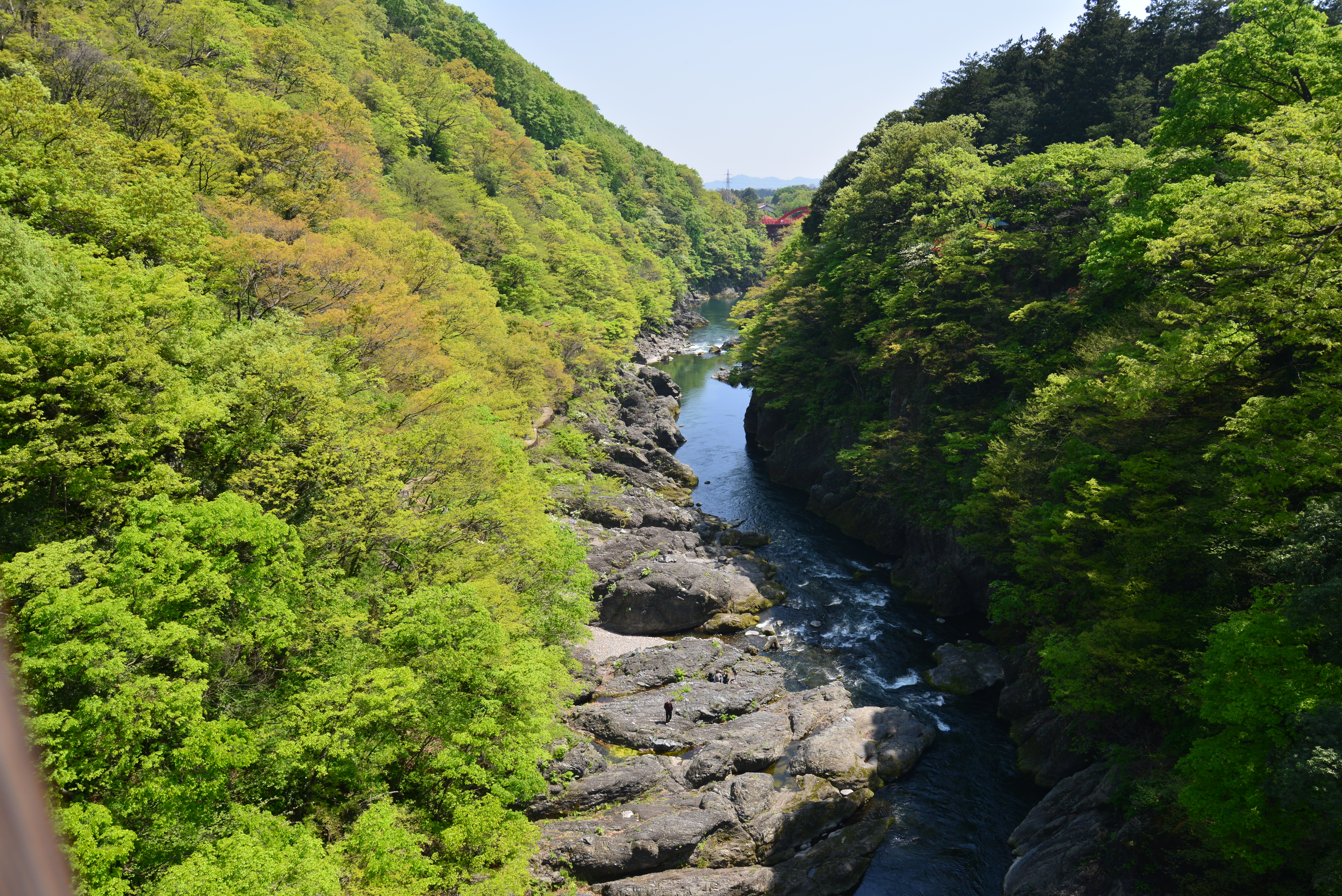 はねたき橋より高津戸峡を撮影